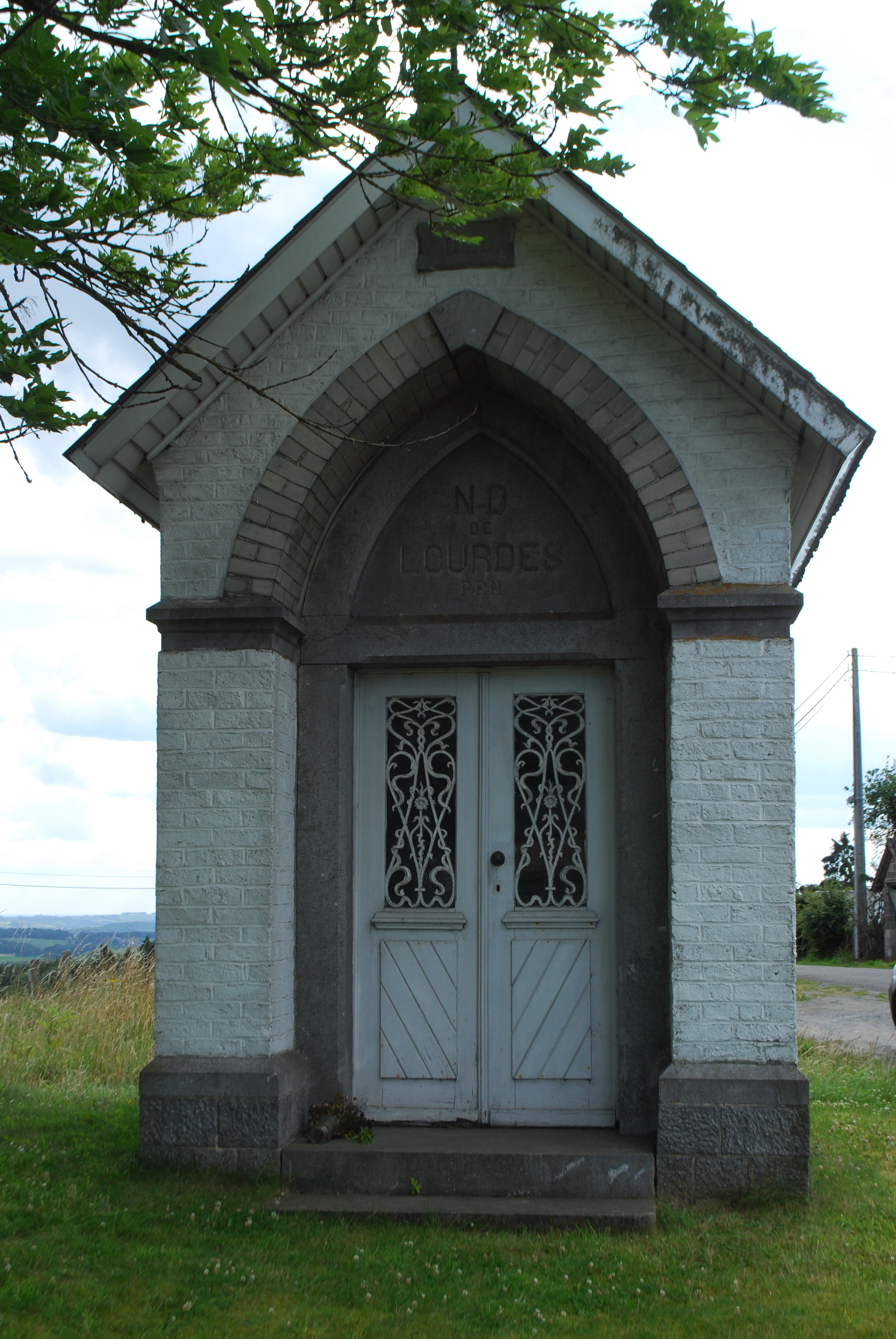 La chapelle Notre-Dame de Lourdes, à Gros-Chêne (Somme-Leuze).